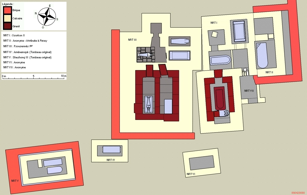 Plan de la nécropole royale de Tanis - XXIe et XXIIe dynasties égyptienne